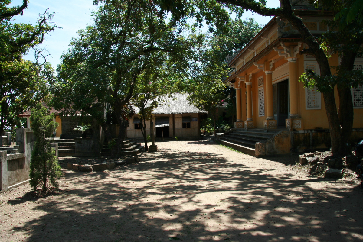 Nhà Phan Bội Châu tại Huế (ngôi nhà tranh), nhà thờ (trái) và phòng trưng bày (phải) hình ảnh, hiện vật liên quan đến Phan Bội Châu.